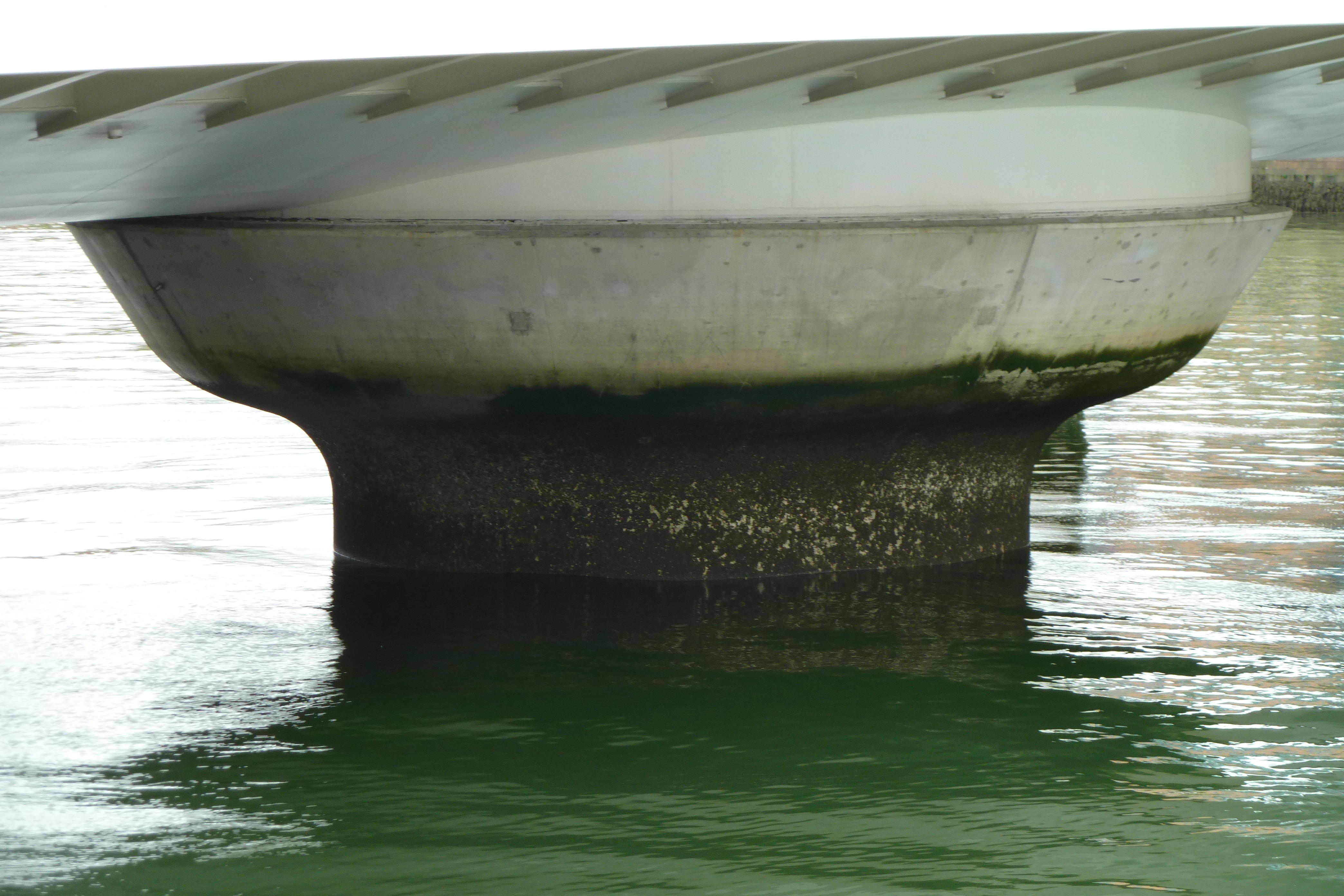 Dublin, Samuel Beckett Bridge, Pier